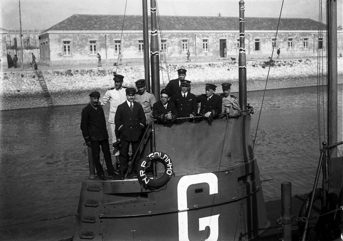 Torre do Submarino Golfinho na doca do bom sucesso em 1918